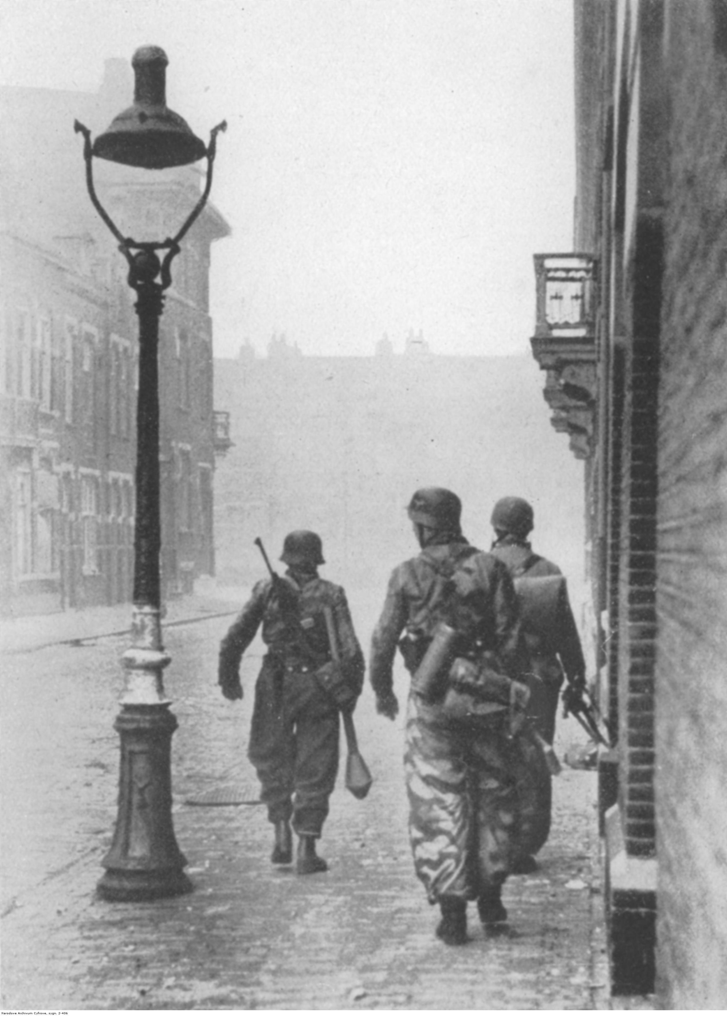 Trzej żołnierze niemieccy idący ulicą. Żołnierz z lewej ma zawieszony na plecach zdobyczny karabinek M1, a w ręku niesie granatnik przeciwpancerny Panzerfaust 30. Widoczna zniszczona latarnia.